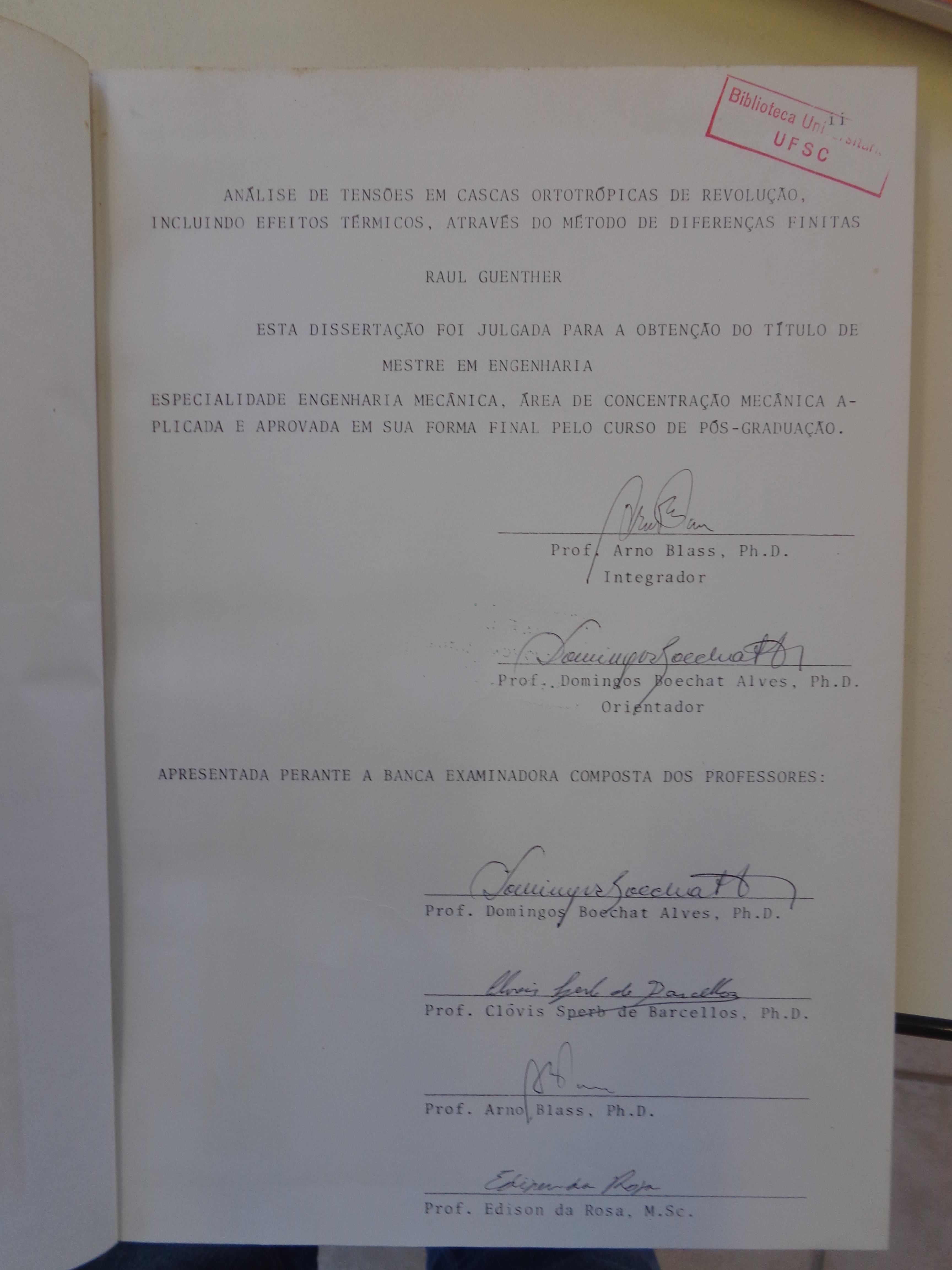 Foto da página descritiva da Dissertação de Mestrado de Raul Guenther, depositada na Biblioteca Central da Universidade Federal de Santa Catarina